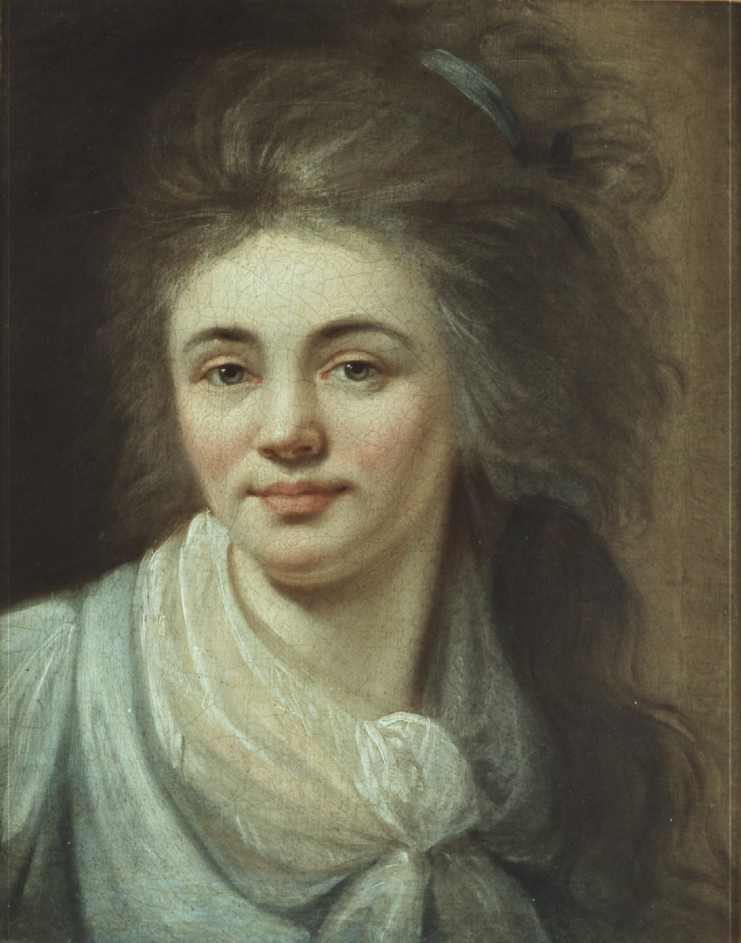 Self-portrait